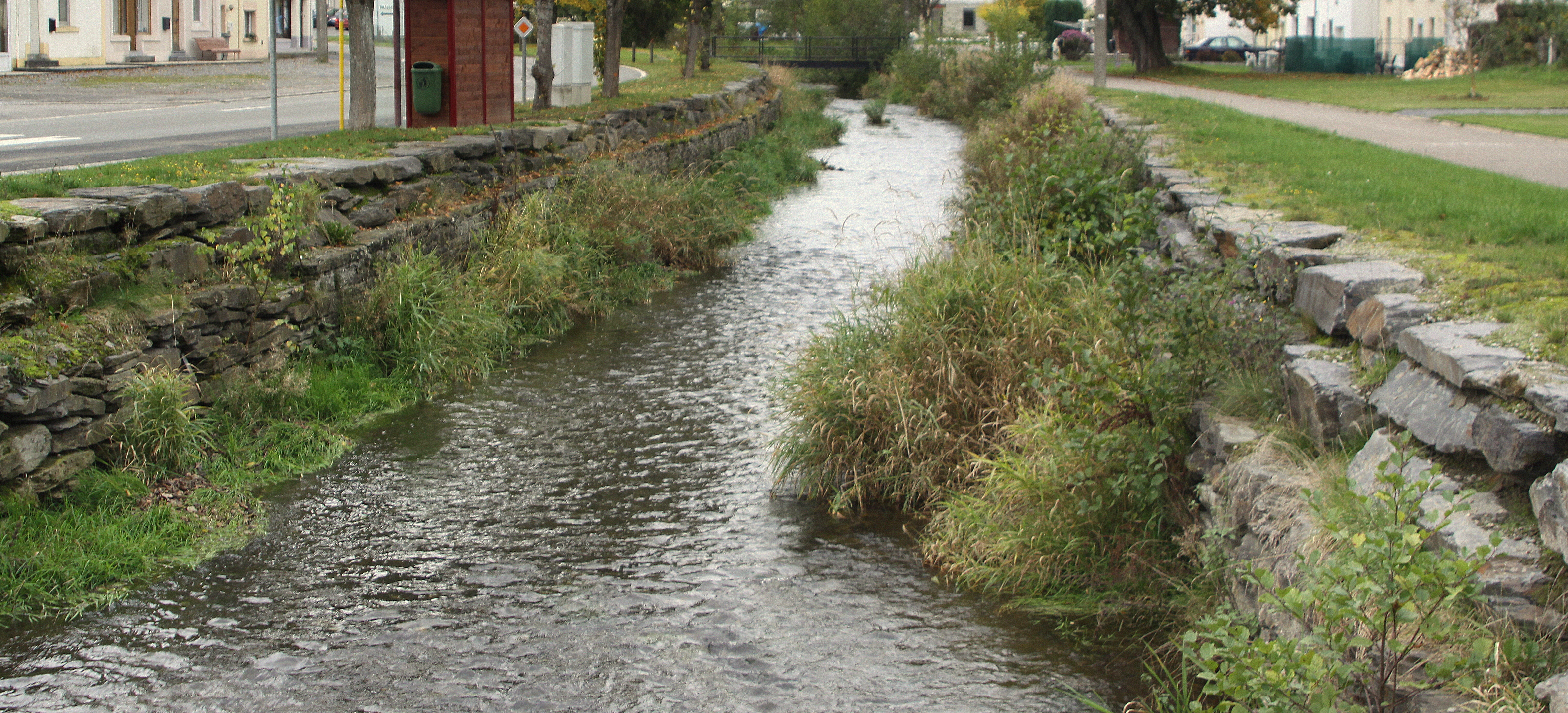 D'Mandebras zu Rulles